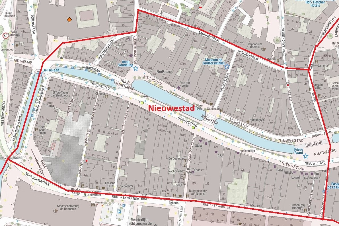 Nieuwestad, buurt in de binnenstad van Leeuwarden